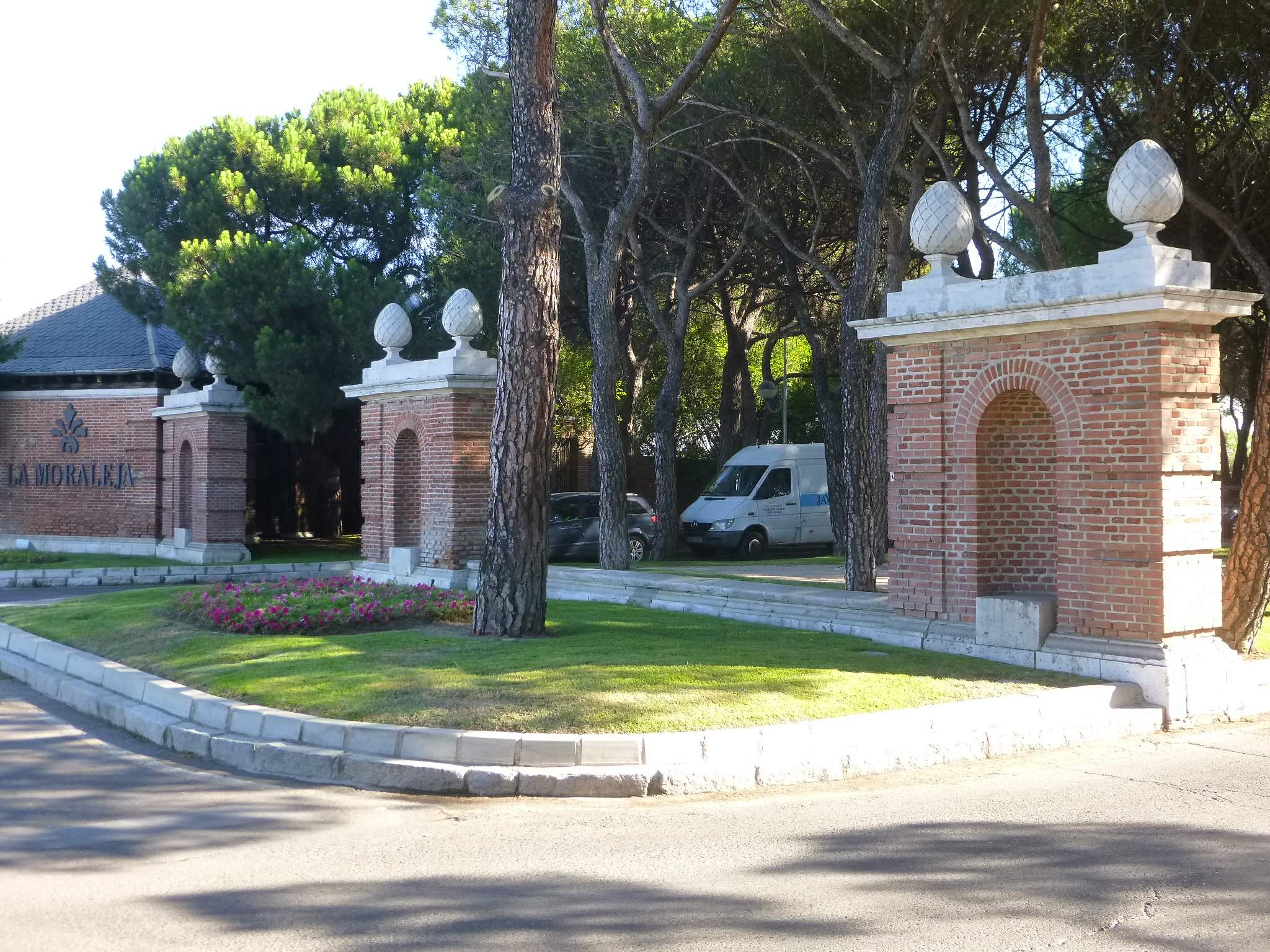 Urbanización La Moraleja (Alcobendas, Madrid)